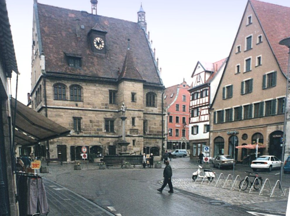 Rathaus der Stadt Weißenburg in Bayern Fotograf: presse03, selbst fotografiert, 2002 Lizenz: GNU-FDL Kategorie:Bild:Rathaus